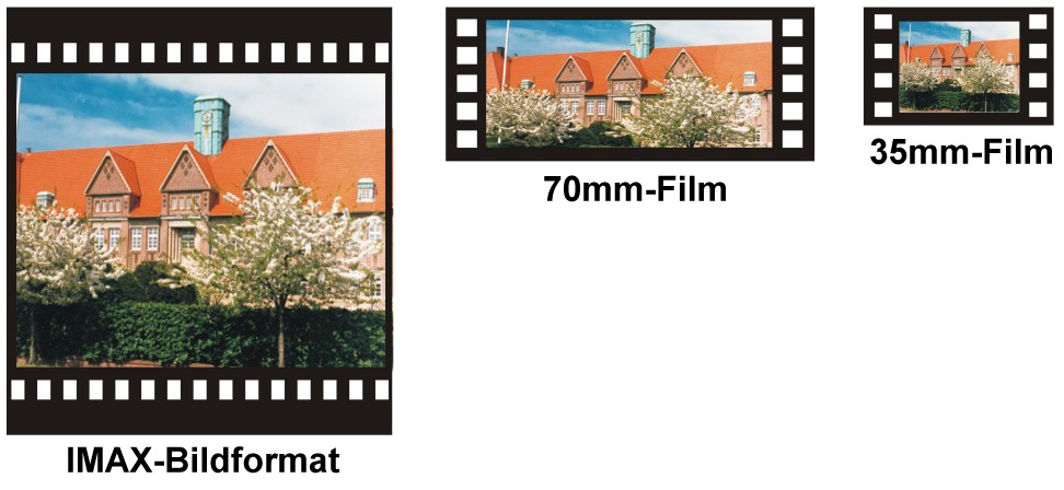 Formatvergleiche: IMAX-Filmbild / 70mm-Film / 35mm-Film